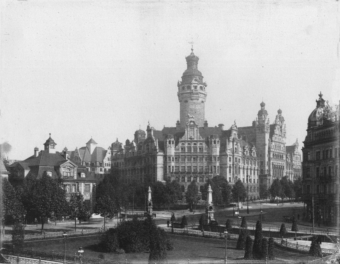 Das Neue Rathaus kurz nach der Fertigstellung, Leipzig nach 1905.